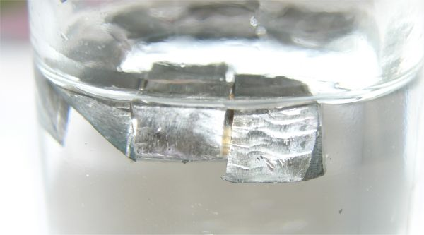 Bildbeschreibung: Lithium unter Paraffinöl Quelle: eigenes Foto Fotograf: Tomihahndorf